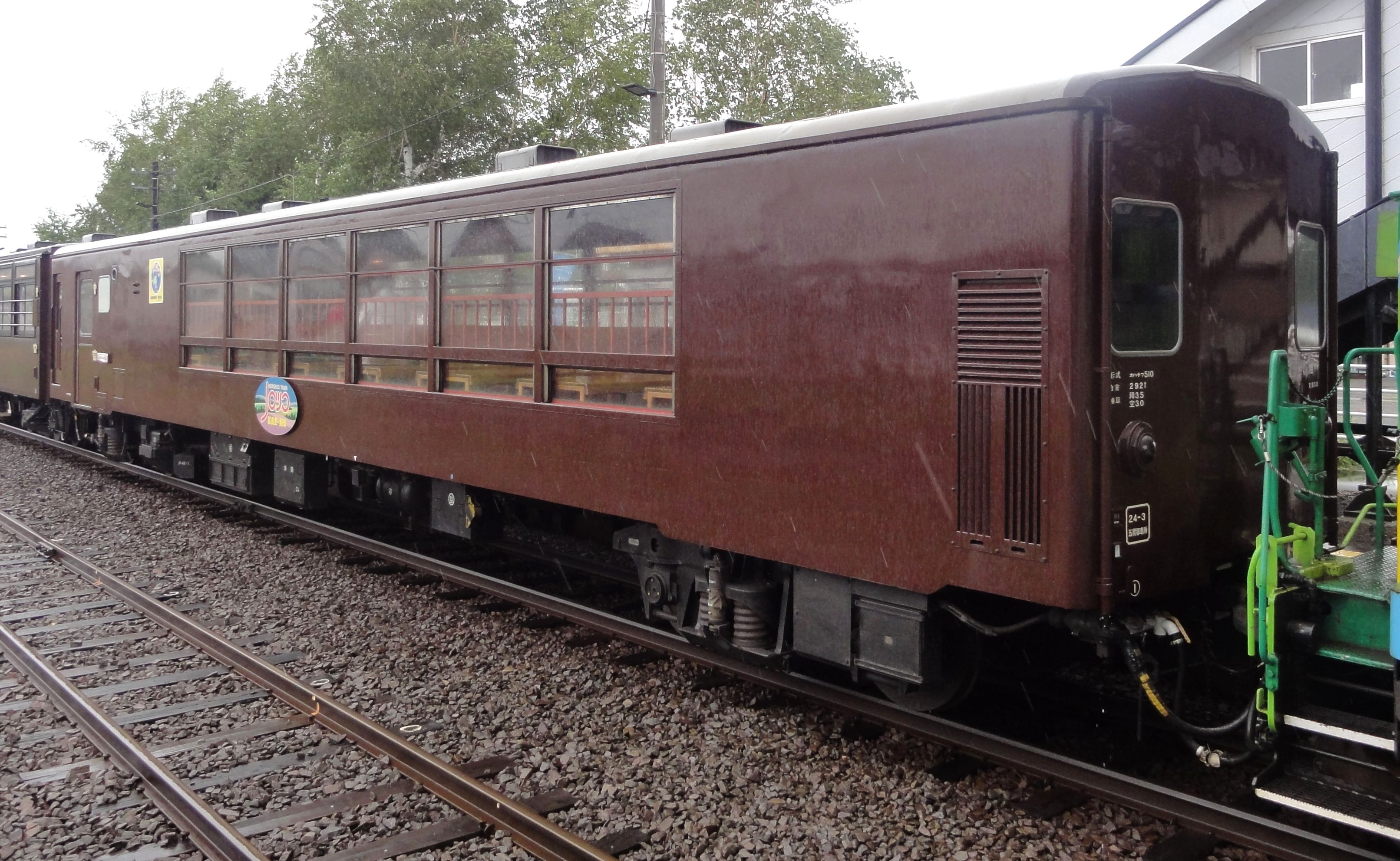 オハテフ510-51・美瑛駅構内にて